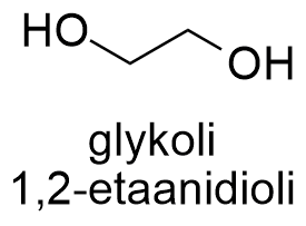 glykoli eli 1,2-etaanidiolin rakenne